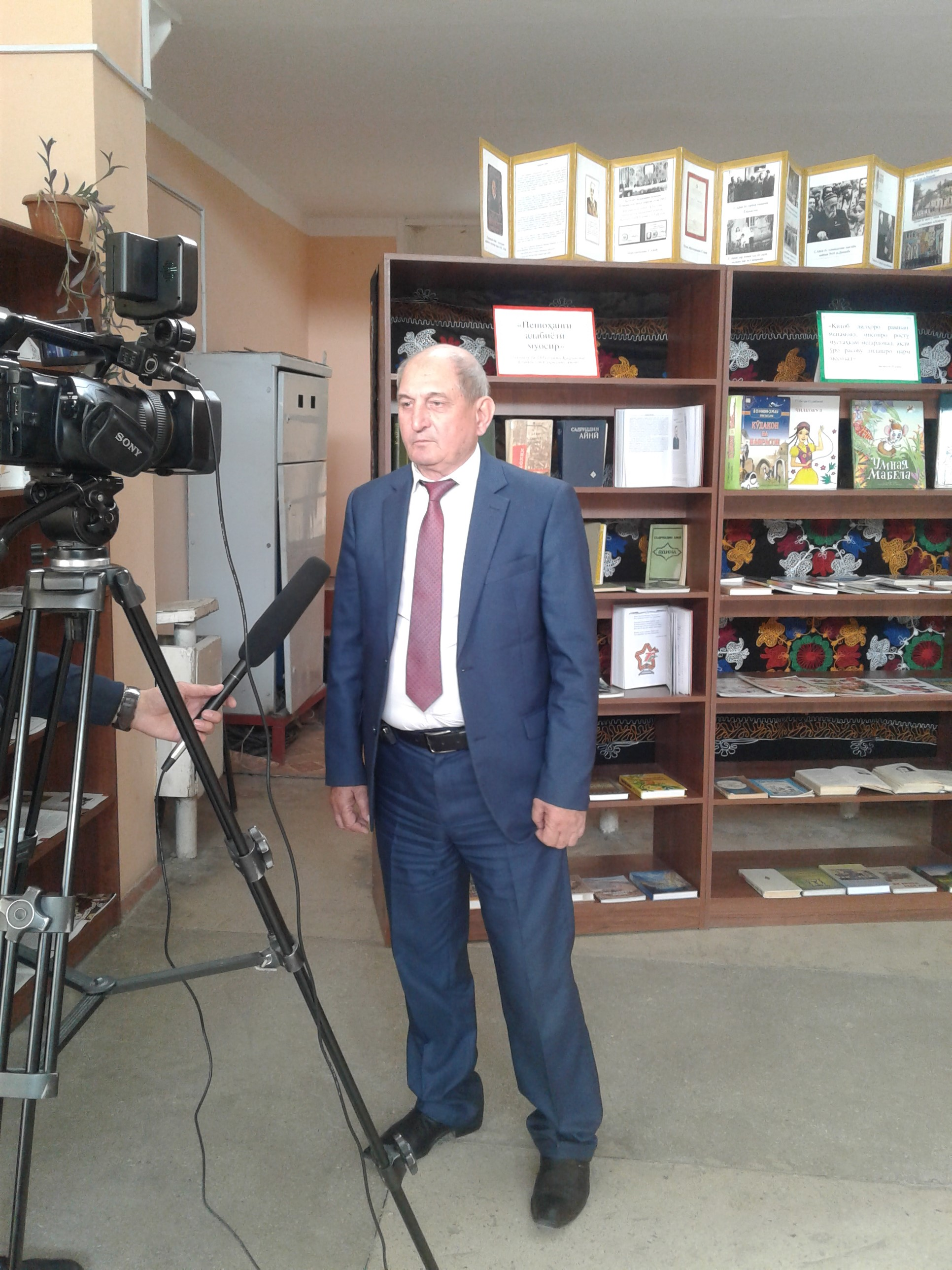 Гулназар Келди, Народный поэт Таджикистана, Лауреат Государственной премии имени А.Рудаки, автор слов Государственного гимна Таджикистана